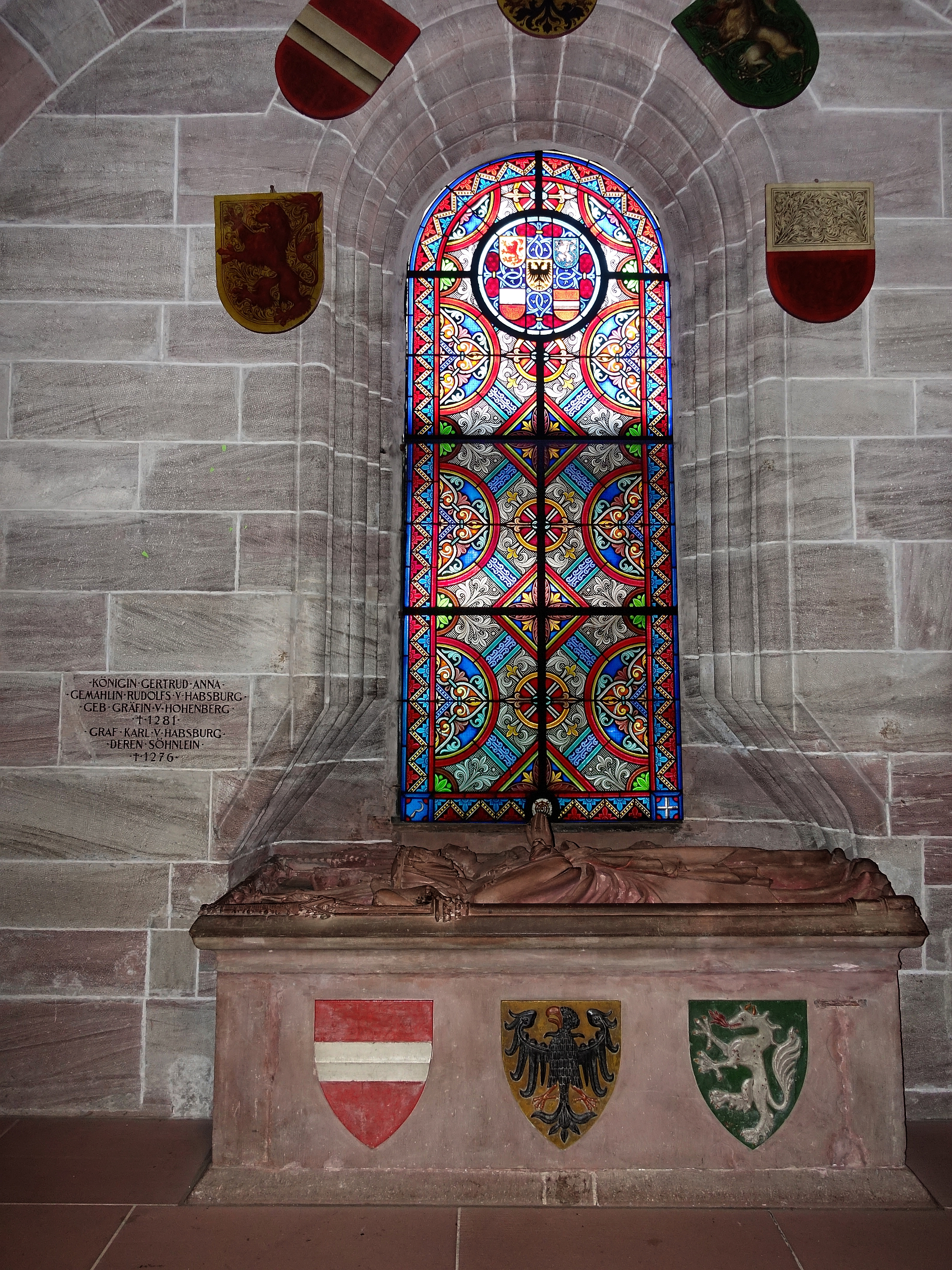 Sarkophag im Basler Münster. Inschrift: Gertrud Anna Gemahlin Rudolfs von Habsburg. Geborene Gräfin von Hohenberg † 1281. Graf Karl von Habsburg, deren Söhnlein † 1276 Tumba Gertruds von Hohenberg und ihres Sohns Karl von Habsburg im Basler Münster, sie zeigt neben dem österreichischen Bindenschild den römisch-deutschen Königsadler und den steirischen Panther